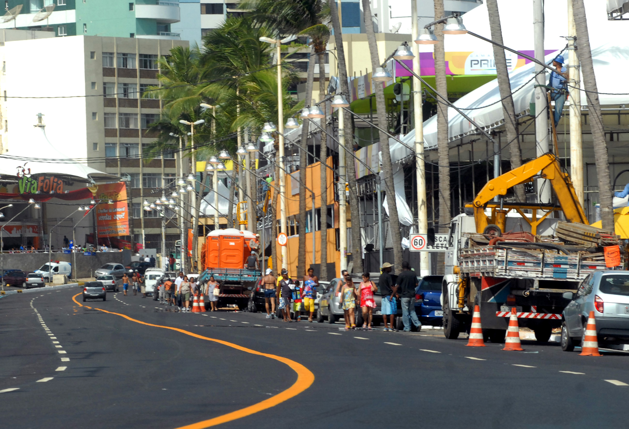 Armação dos camarotes no circuito Barra-Ondina para a festa do carnaval que começa no dia 31 de janeiro, Salvador (BA).